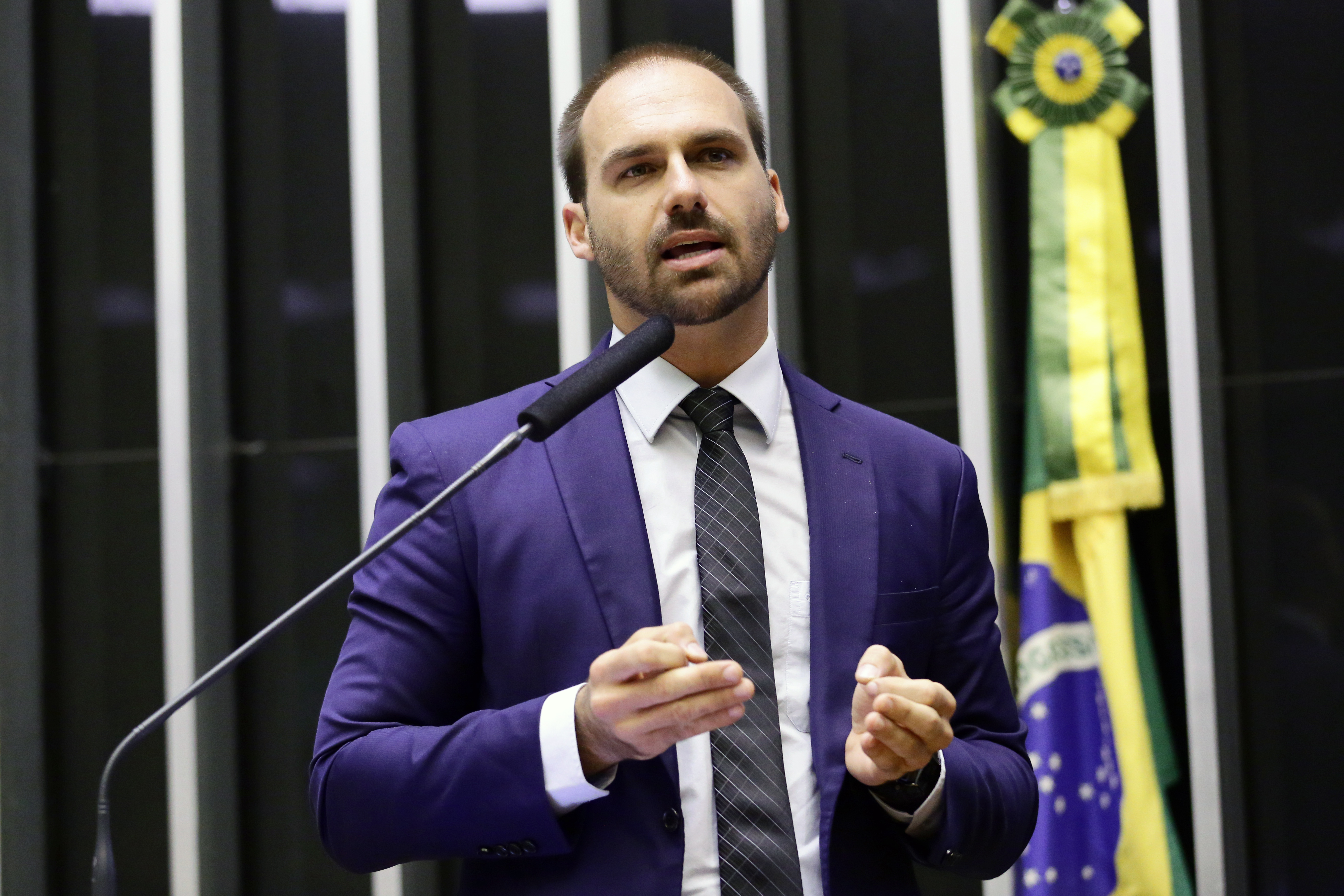 Homenagem aos 210 Anos da Polícia Militar do Estado do Rio de Janeiro. Dep. Eduardo Bolsonaro (PSL-SP)